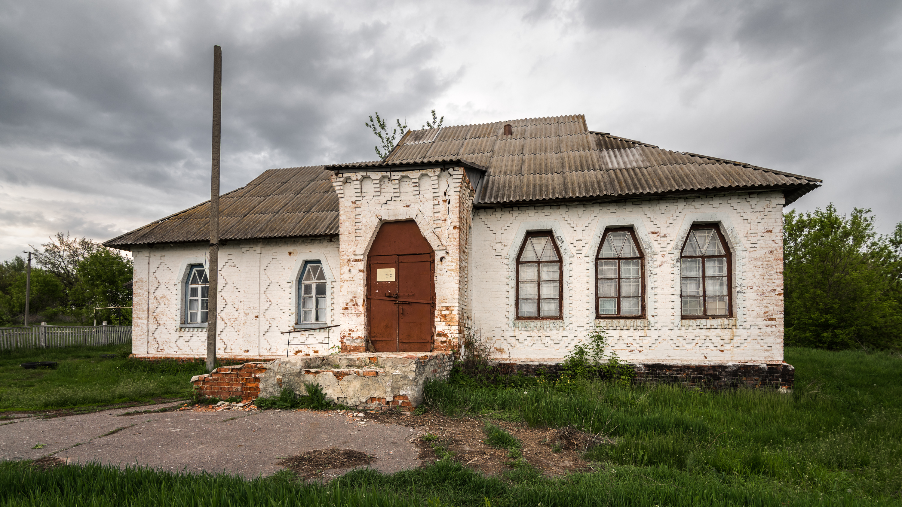 Однокомплектна земська школа в селі Старий Хутір Лохвицького району Полтавської області. Стиль - український архітектурний модерн. Архітектор Опанас Сластьон.